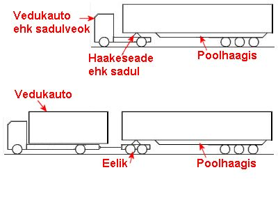 Poolhaagis